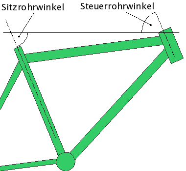 Das Bild zeigt die Winkelmaße eines Fahrrad-Diamantrahmens Bild wurde mit Draw selbst erstellt Erstellt von: Bernd Gutmann